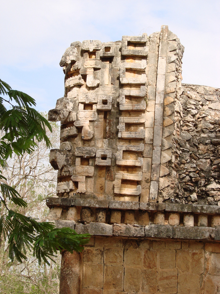 Xlapak, Yucatán, México